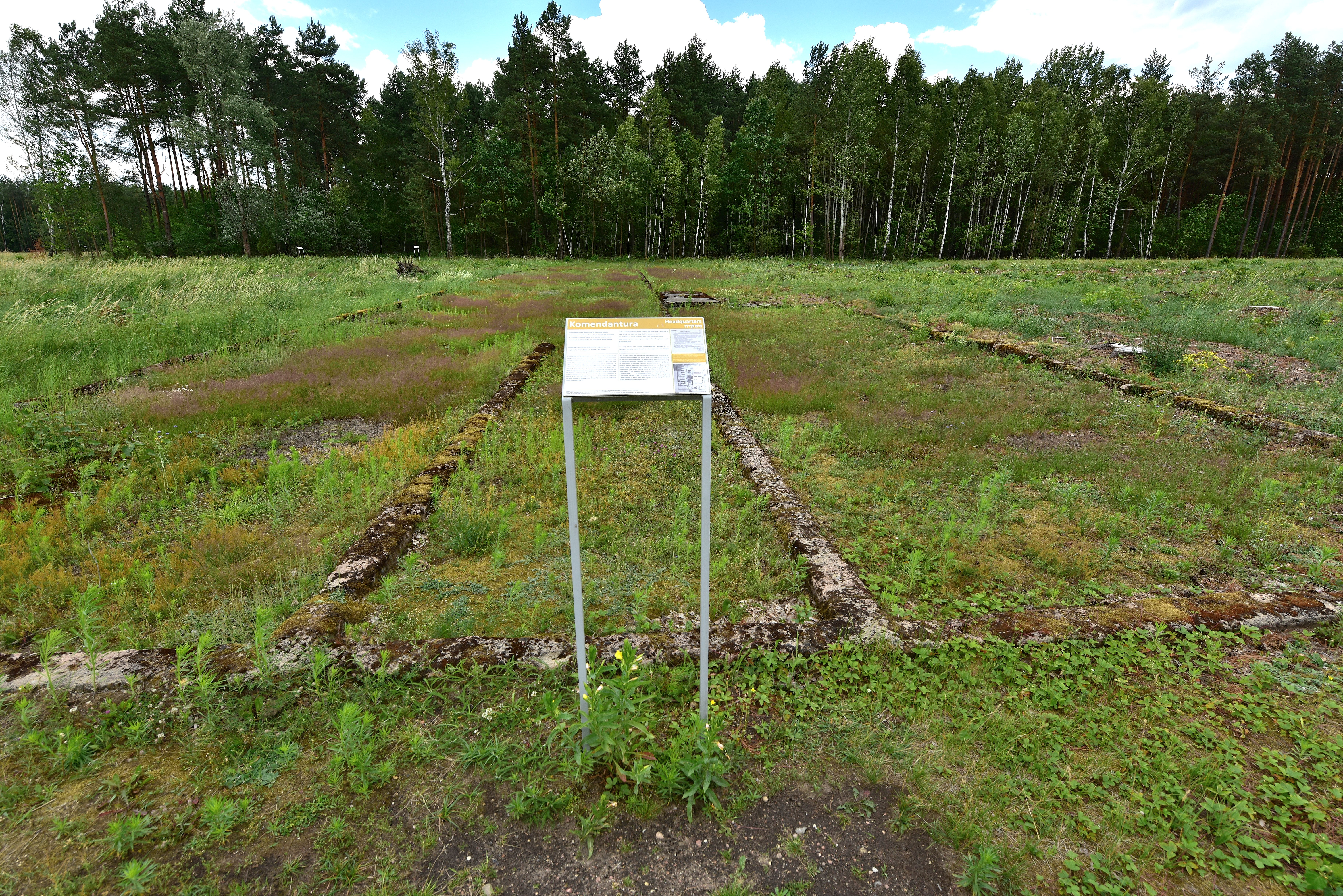 Karny obóz pracy w Treblince. Komendantura